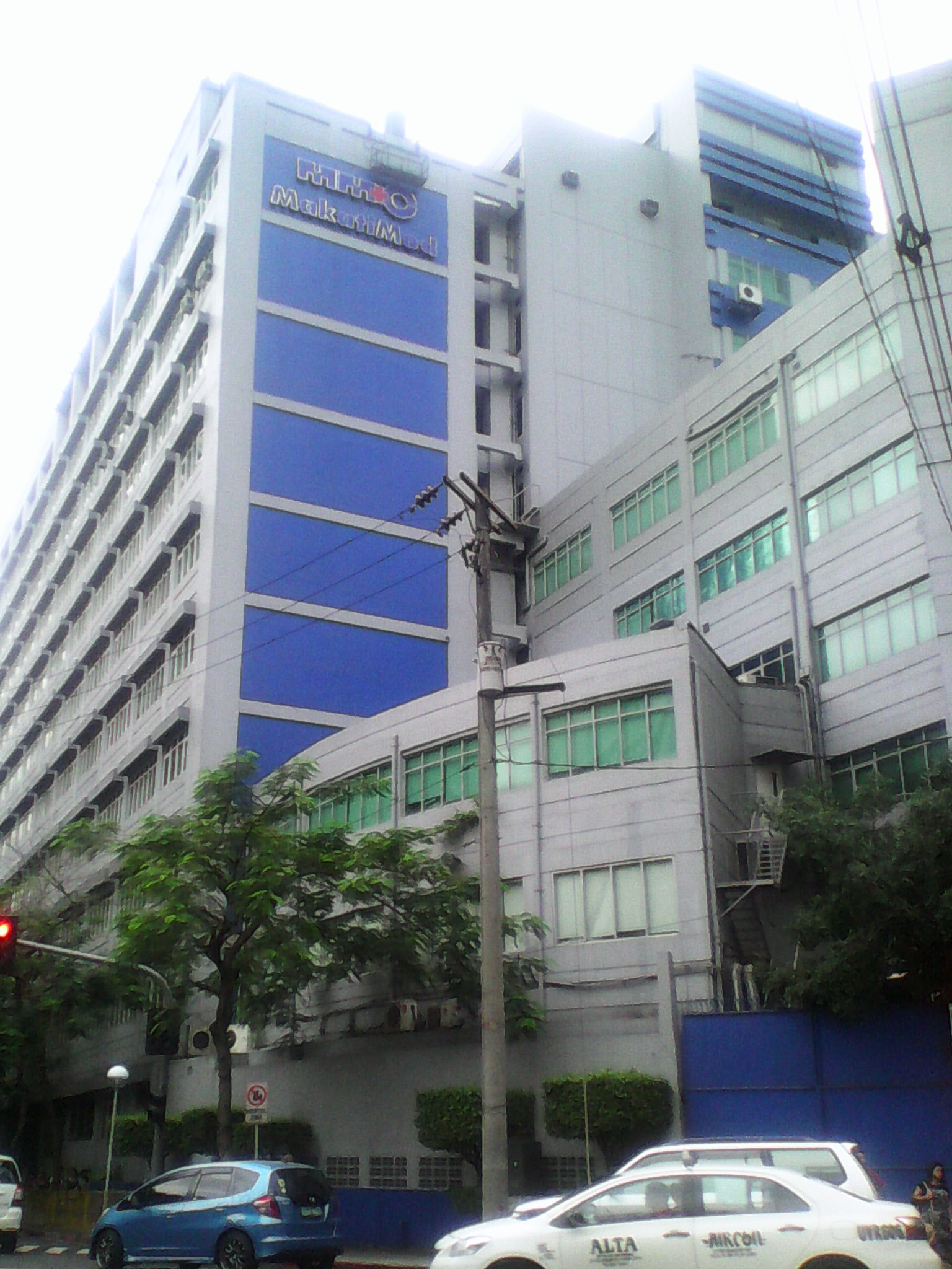 Makati Medical Center